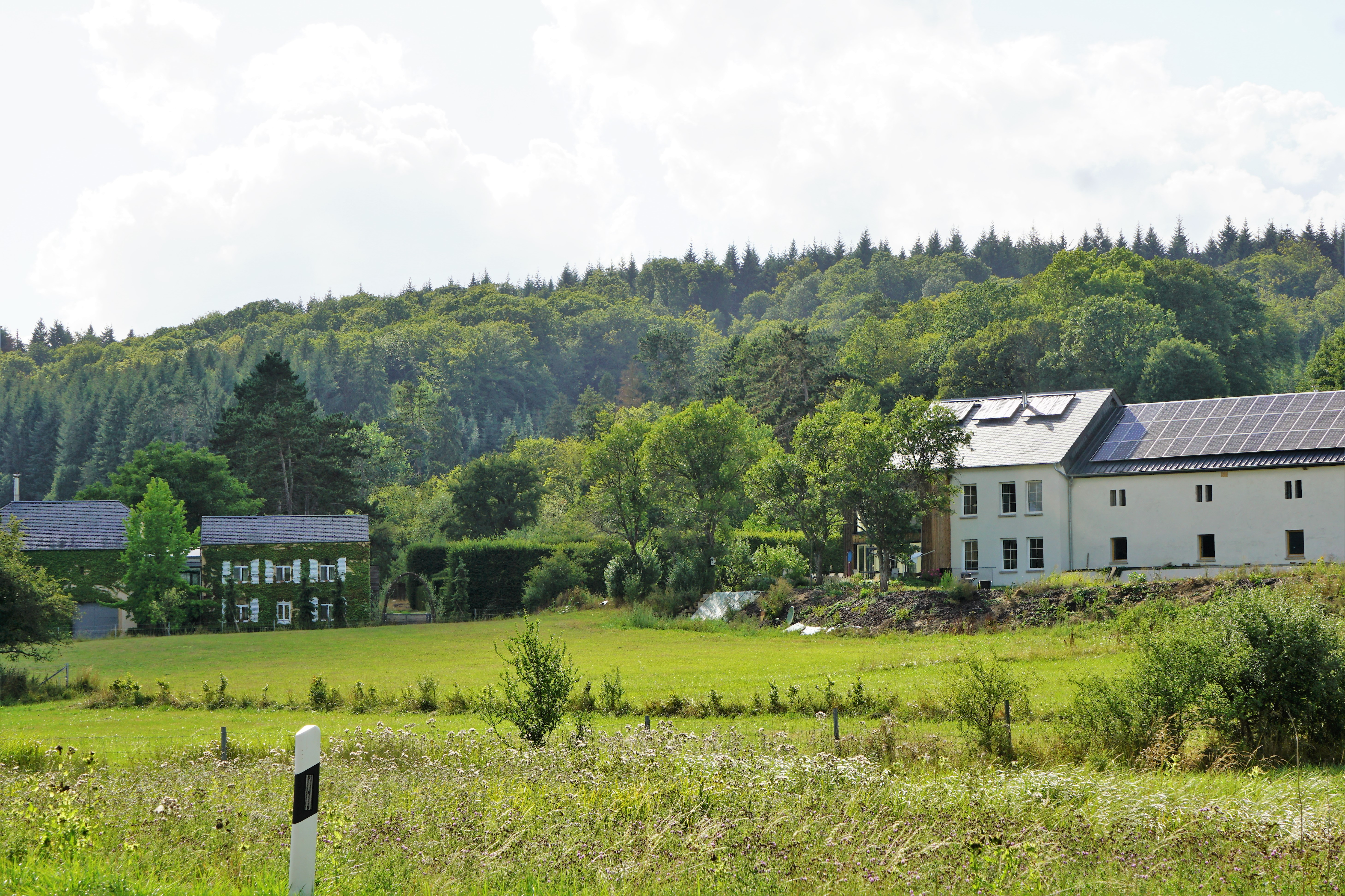 Commune de Fischbach, lieu-dit Koedange (Kéideng).